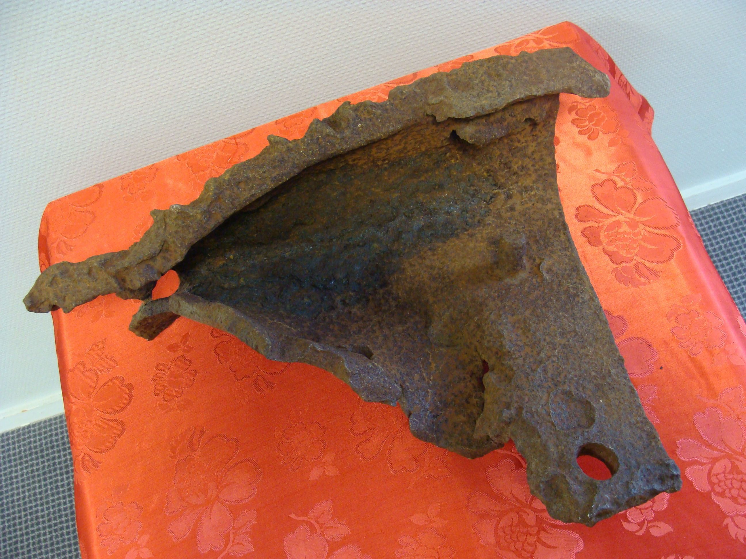 Monsieur René Le Guern a trouvé ce fragment de l'Ocean Liberty dans son jardin, dans le quartier de Saint-Marc, après l'explosion. La taille du rivet déboutonné et la déformation de la tôle de coque laissent imaginer la force de l'explosion. Poids de la pièce : 12 kg.